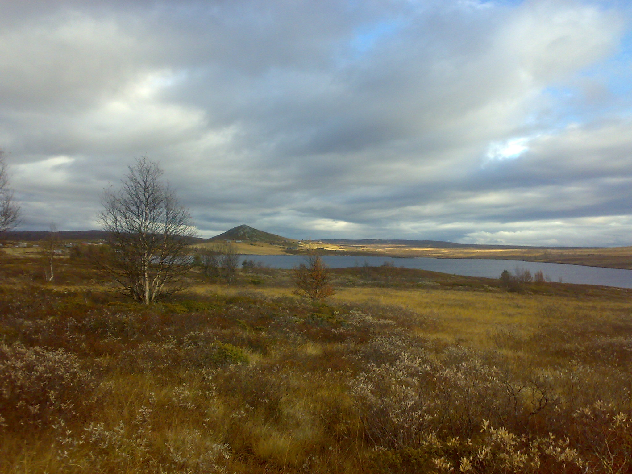 På Stølsvidda i Valdres (Norway) ved Vaset, nedunder Gullberghøgda mot Valtjern og Valtjernstølan. Knatten i bakgrunnen.